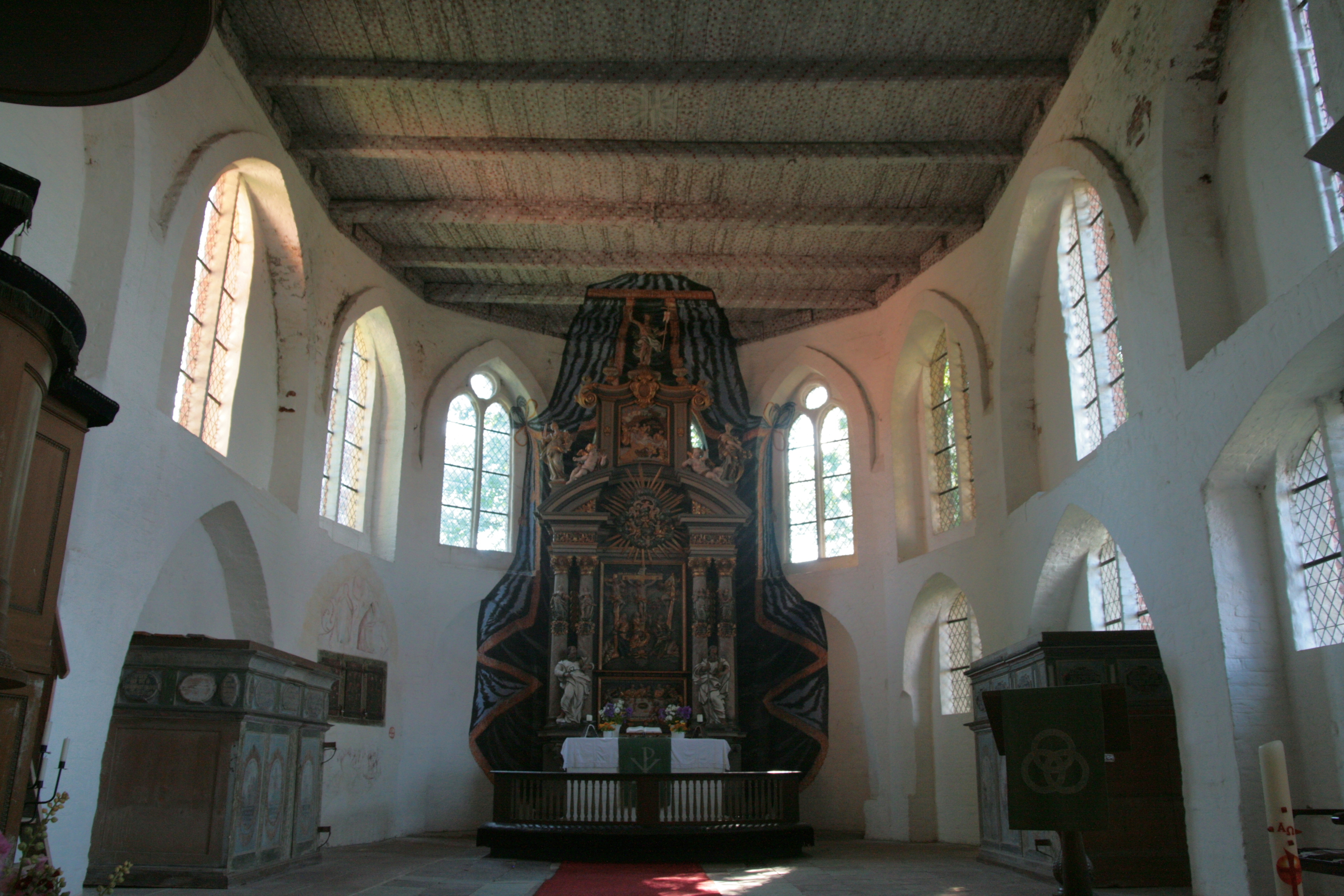 Sagard, St.Michael: Altar von Elias Keßler, Beichtstühle, Chorraum